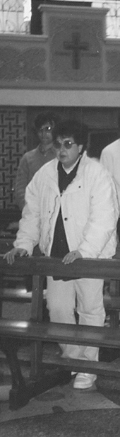 Copyright: Alexander Deriev, Sweden